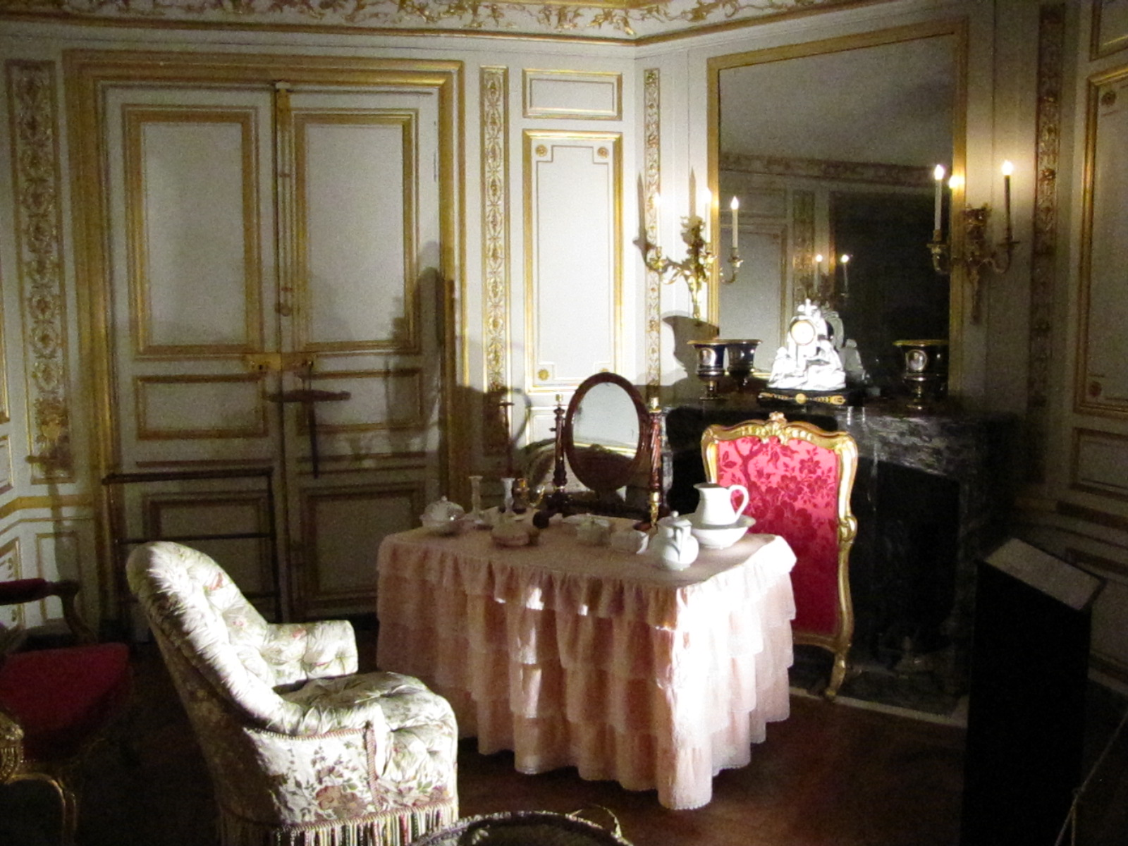 Vue du premier cabinet de toilette de l'appartement du pape au château de Fontainebleau.